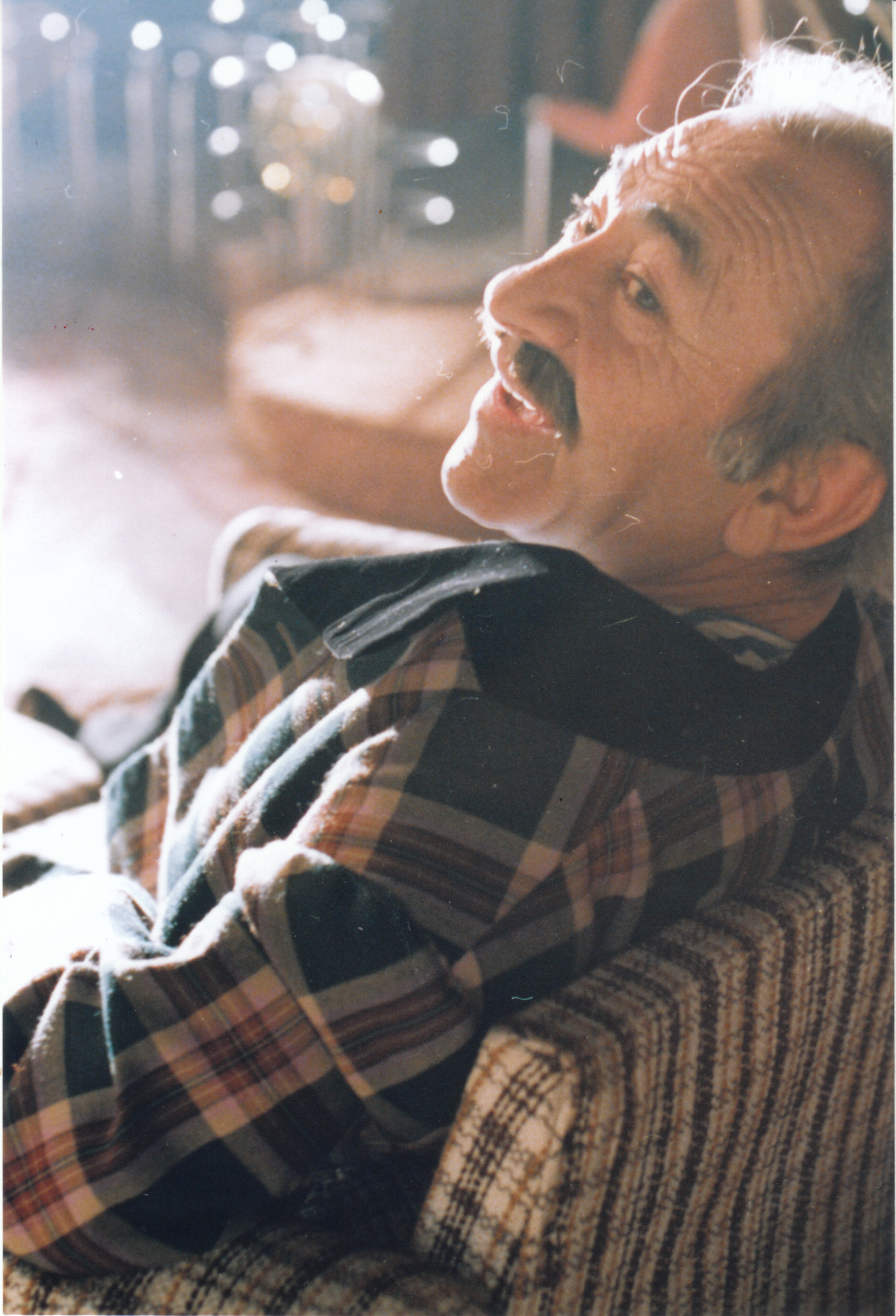 „Бавачките“ - режисьор Слави Шкаров Минко Минков в ролята на Петрос